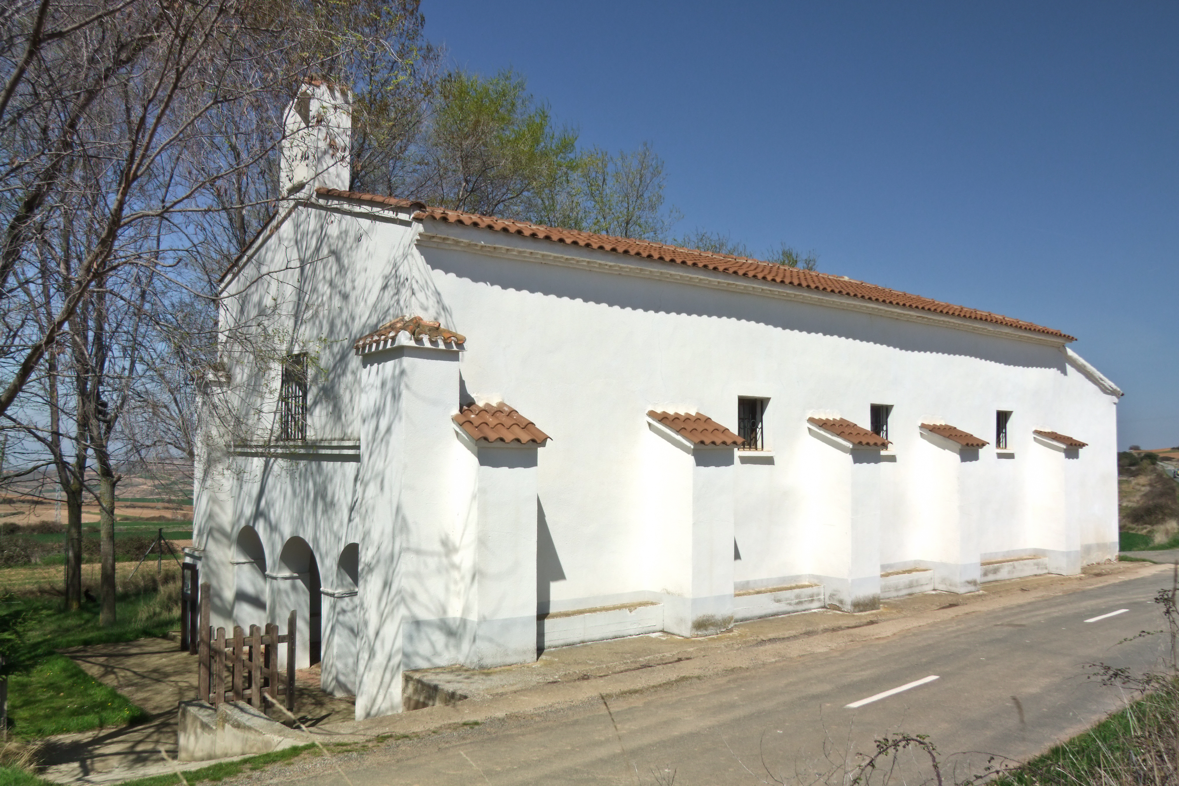 Ermita del Carmen en la localidad de Santa Lucía de Ocón, La Rioja - España